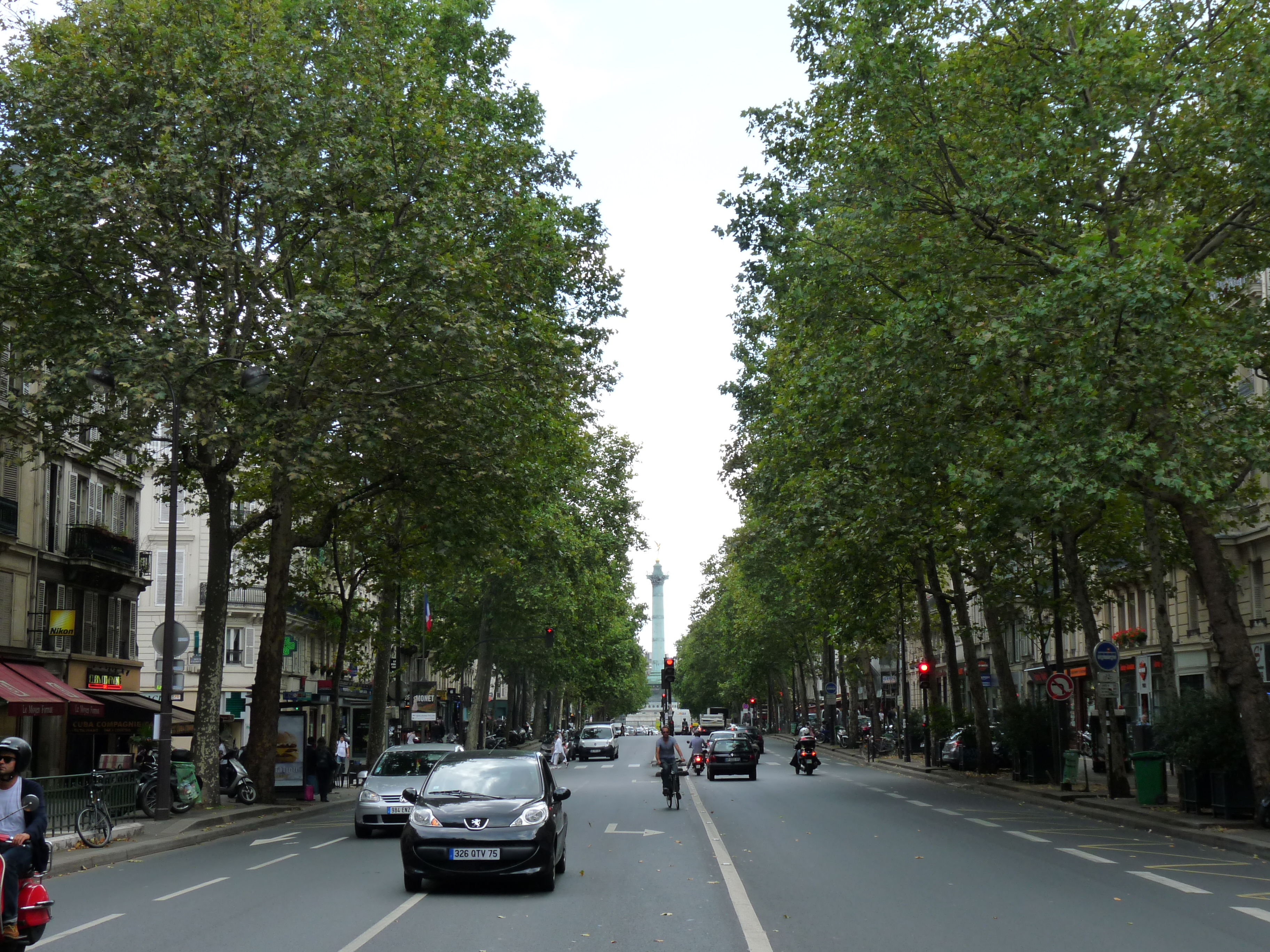 Le Boulevard Beaumarchais a Paris, vue vers la place de la Bastille